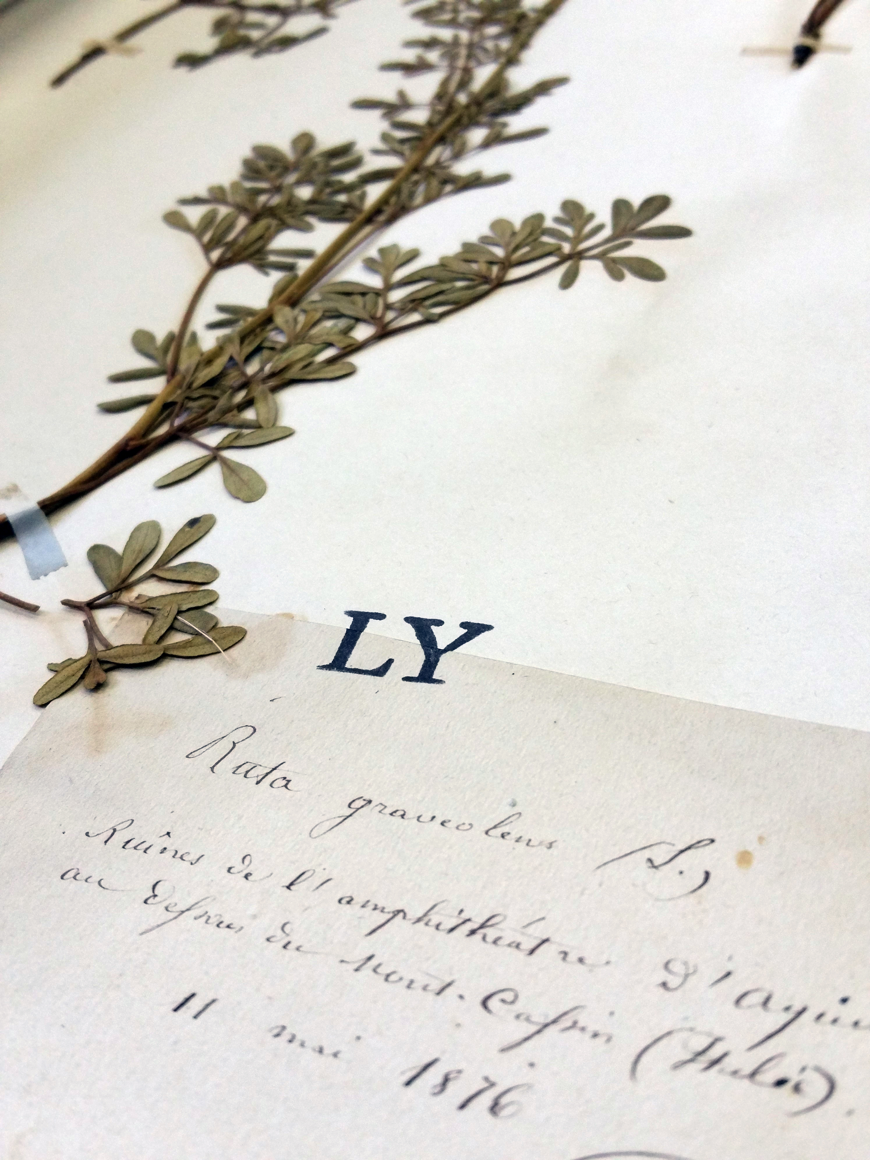 Ruta graveolens